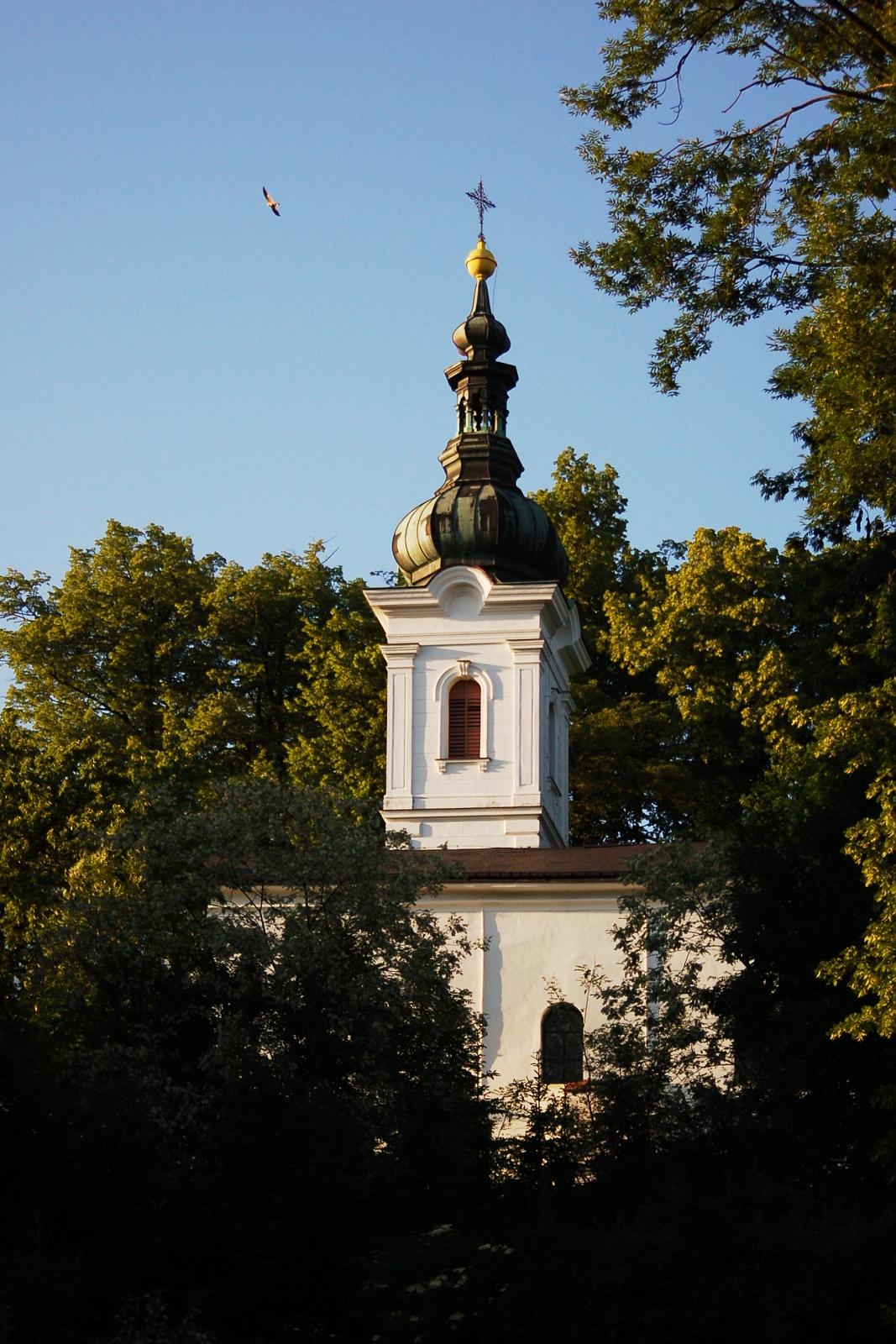 Kostel Nanebevzetí Paní Marie, Vsetín - pohled z městského parku